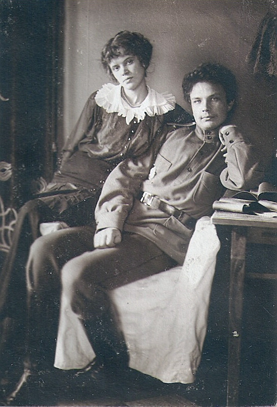 Маштаков Н.И. и Маштакова (Степанова) Вера Васильевна.